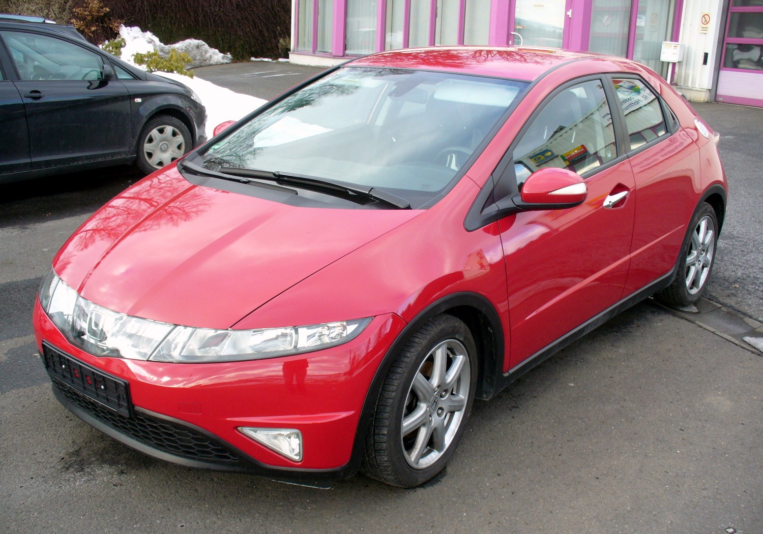 Honda Civic